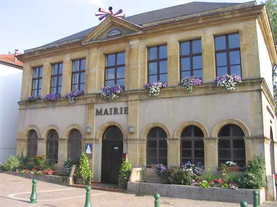 Mairie de Coume